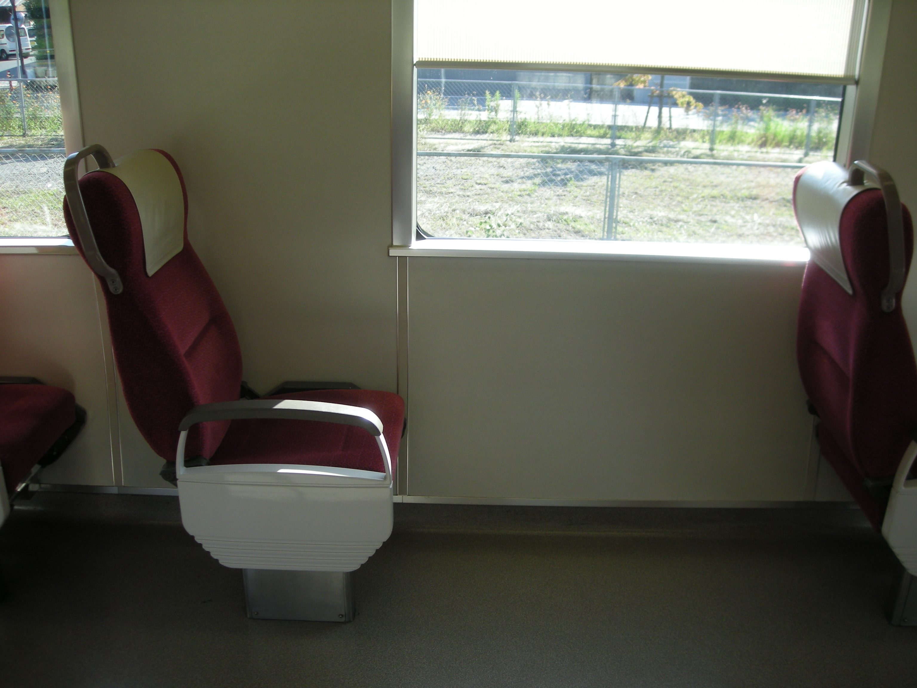 125系ゆとりスペース